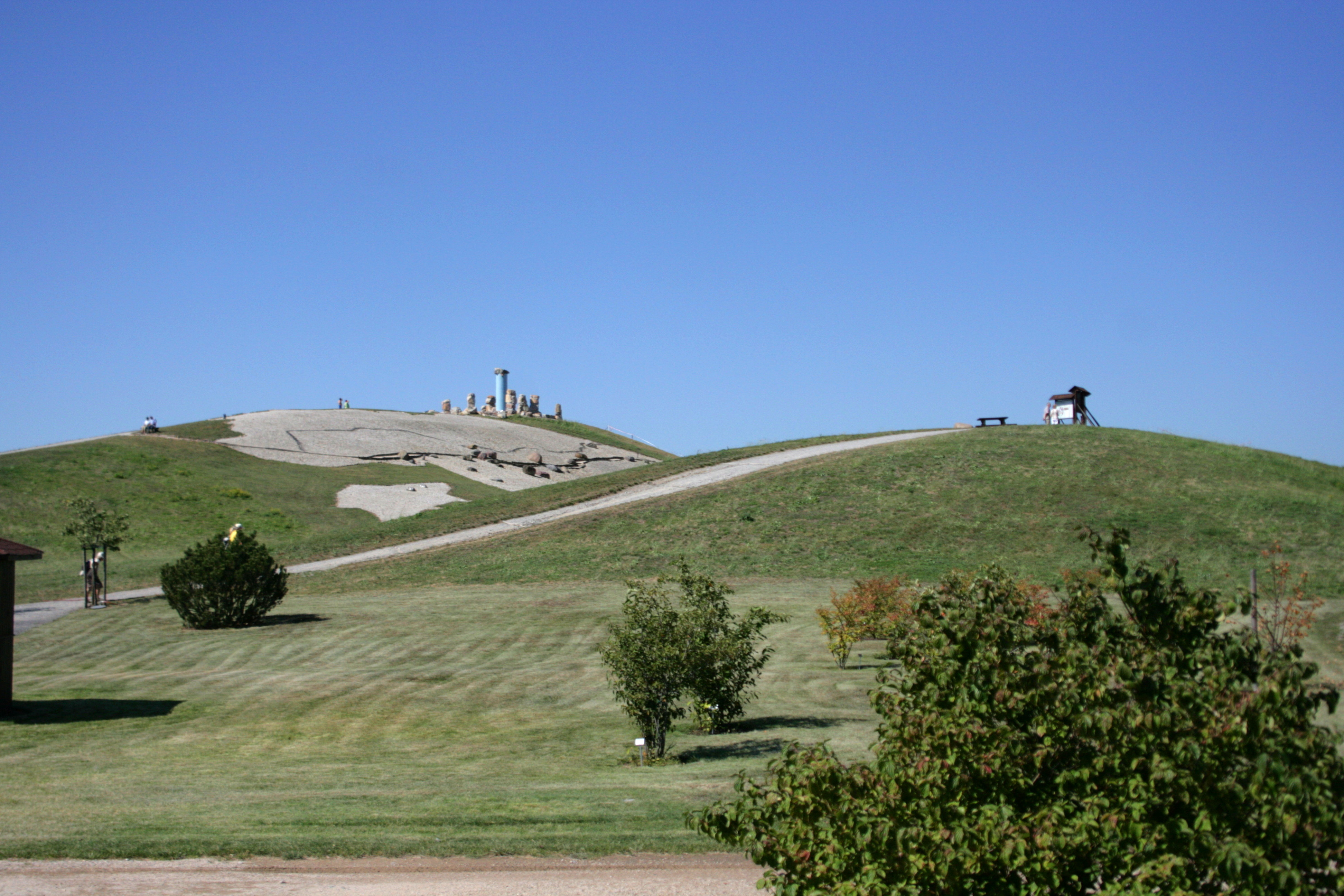 Findlingspark Nochten in Boxberg/O.L.-Nochten